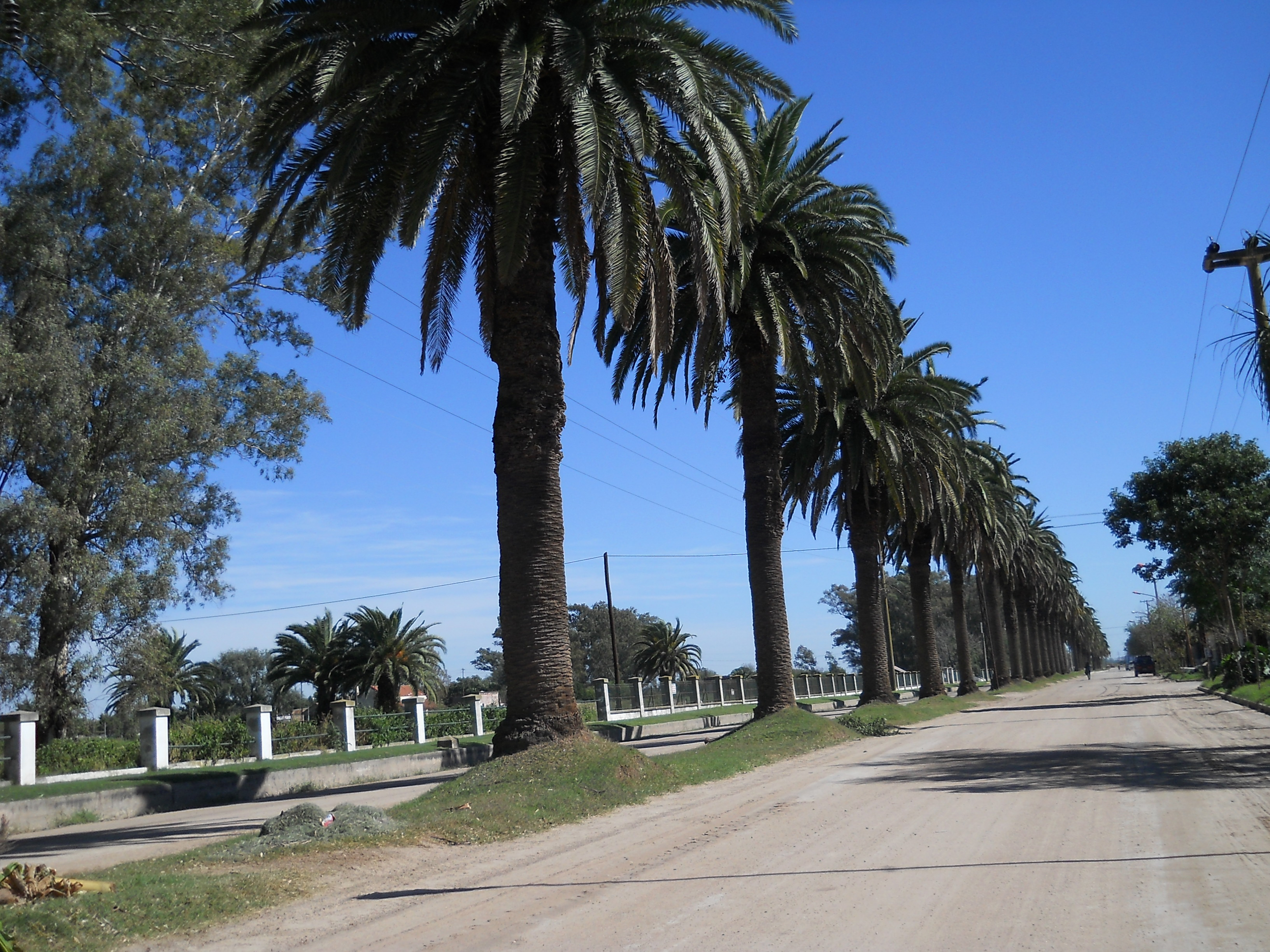 Ballesteros